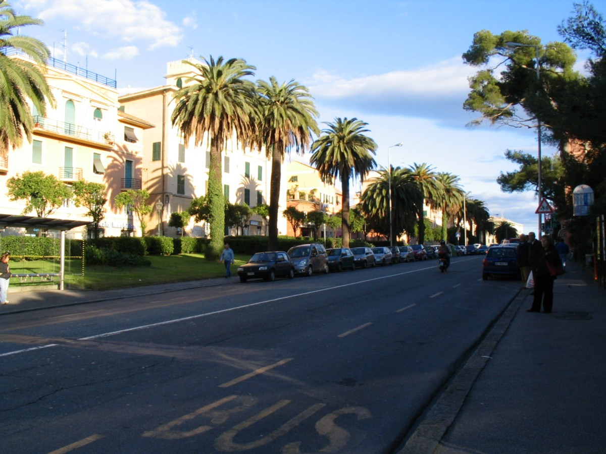 Veduta del lungomare di Quinto al Mare (Genova)